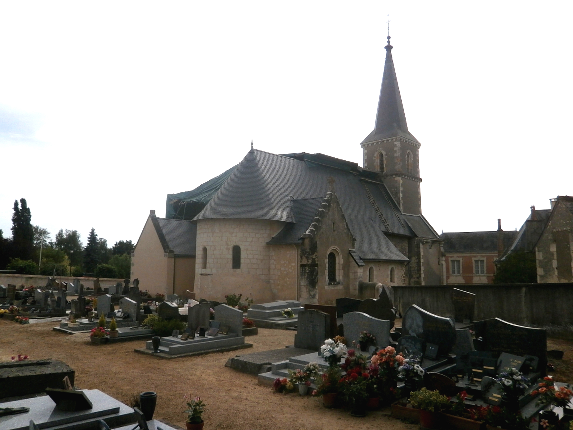 L'église.